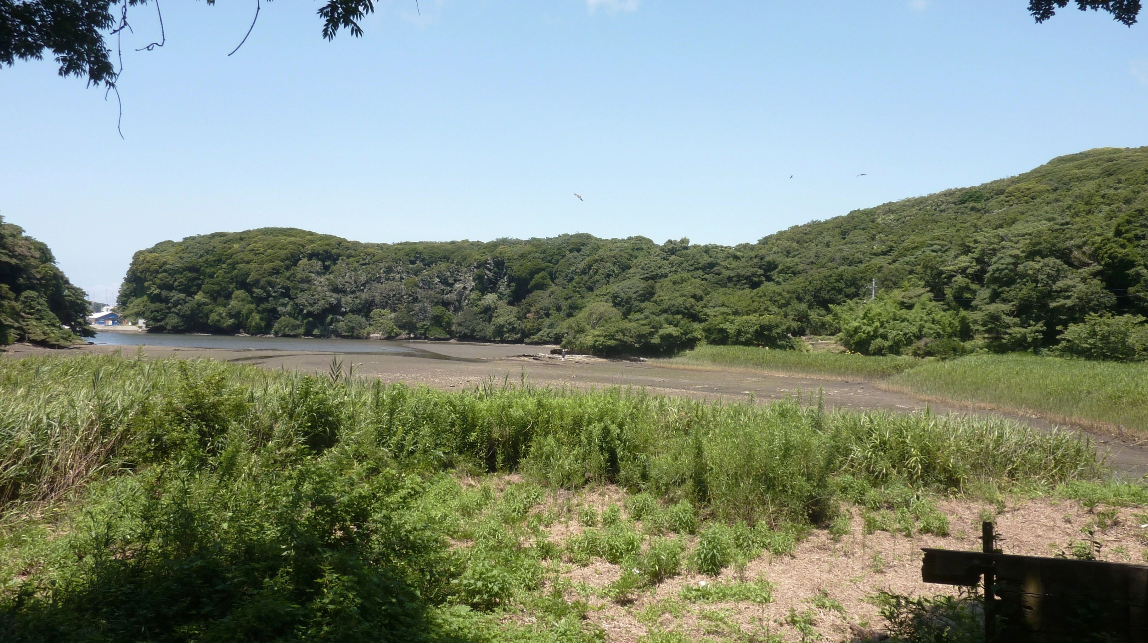 神奈川県三浦市・「小網代の森」河口干潟（小網代湾）